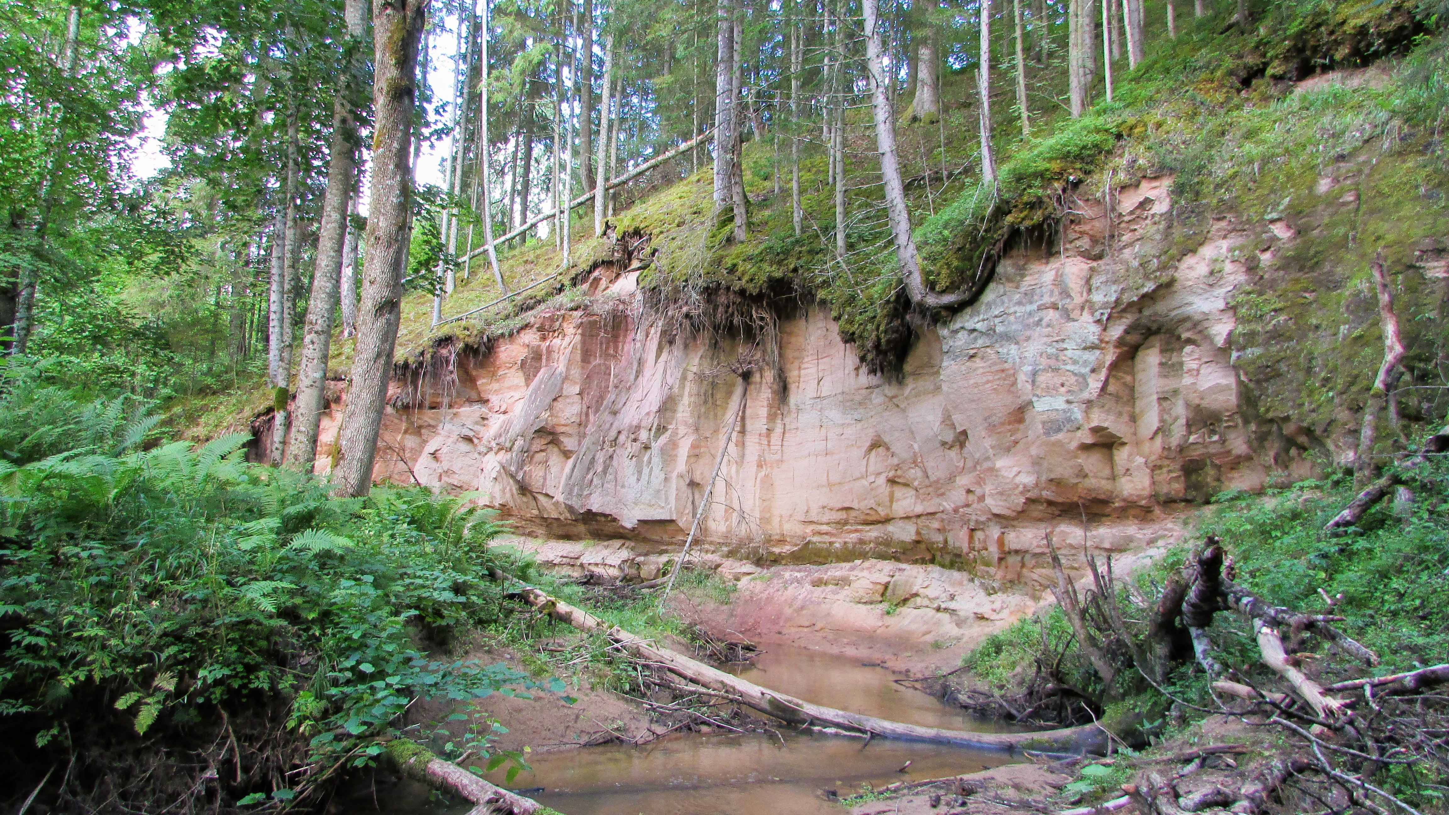 Kaļķupītes klintis, Dundagas novads